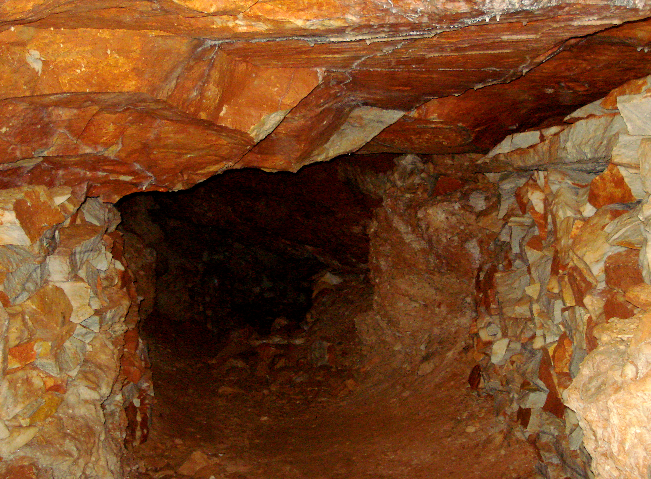 Άποψη στοάς αρχαίων λατομείων Πάρου